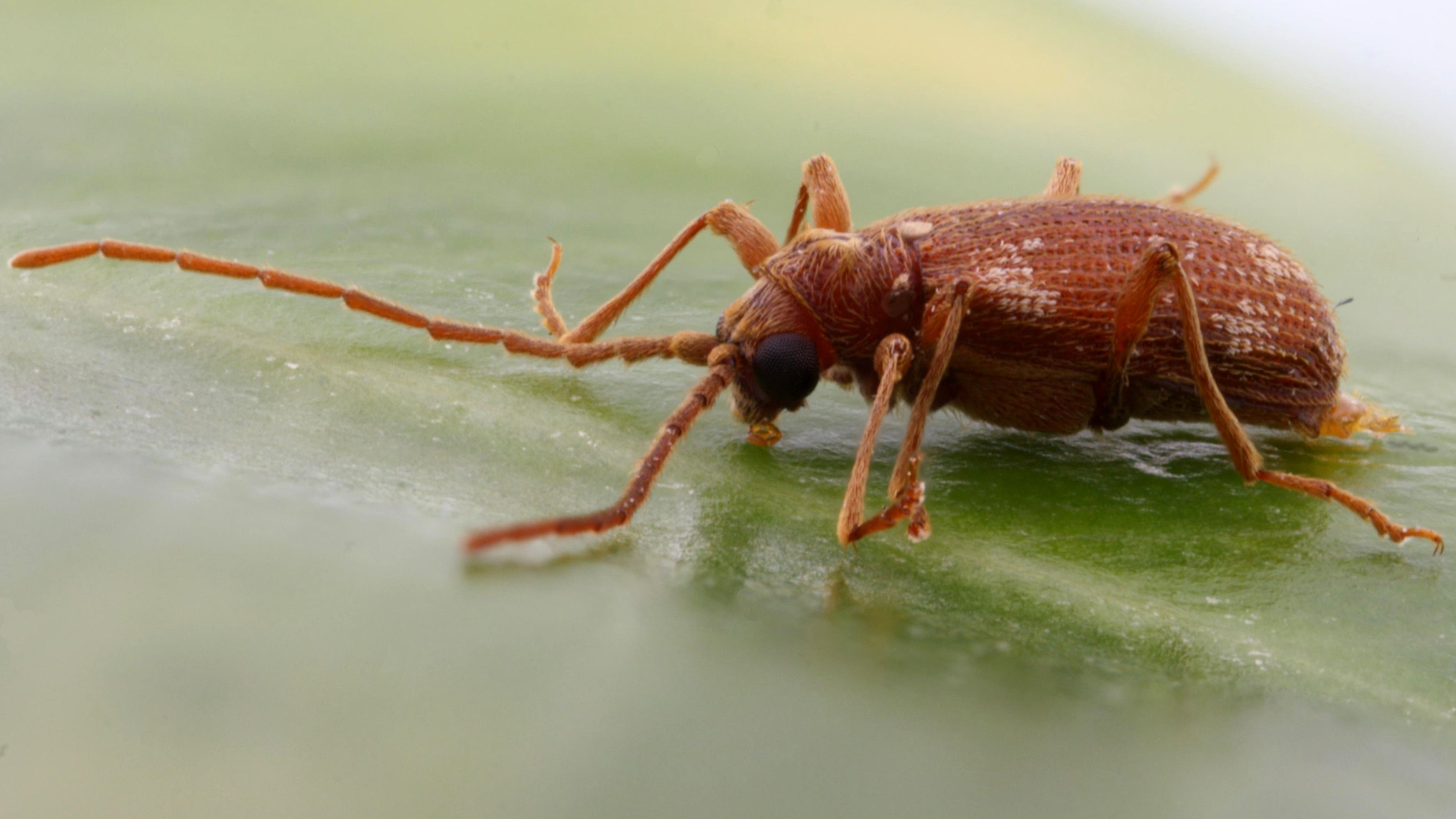 hann av flekket tyvbille